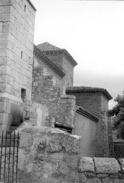 Iglesia de San Cipriano - San Cebrián de Mazote (Valladolid) - Fotografía. Papel 75 x 105 mm B/N